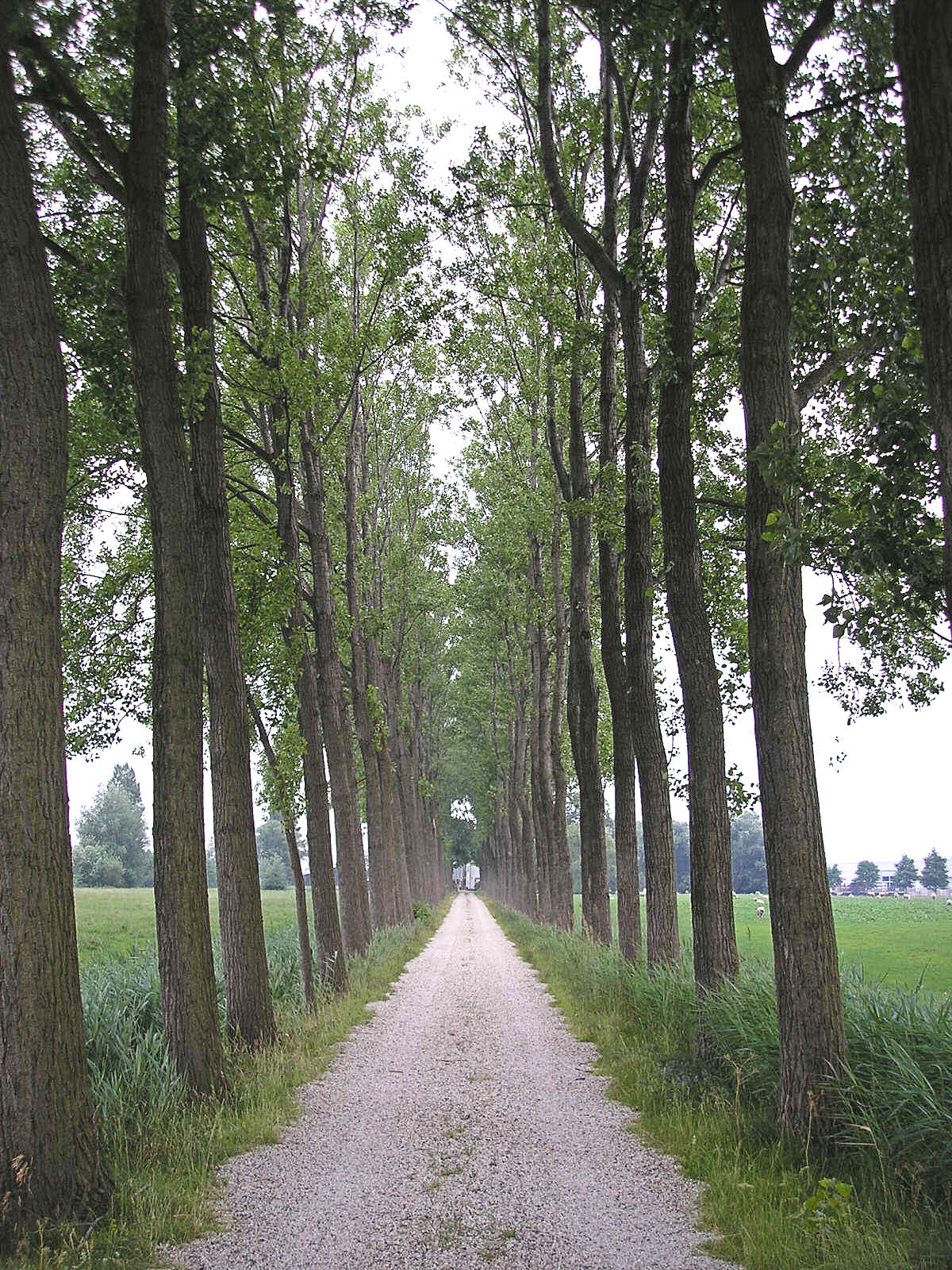 Some tree-lined road with populus near Hazerswoude Location: Hazerswoude, South Holland, Netherlands --- nl: Laantje met bomen nabij Hazerswoude Locatie: Hazerswoude, Zuid-Holland, Nederland